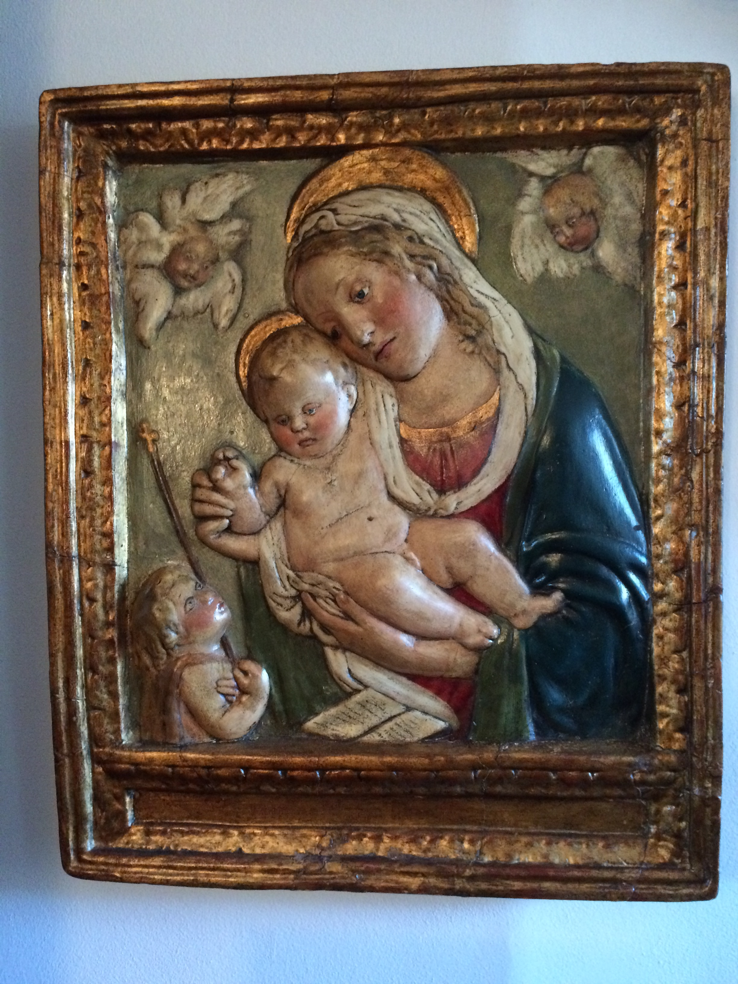 Madonna col Bambino e San Giovannino - cartapesta e stucco